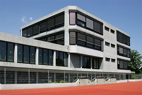 Thomasgarten-Schulhaus in Oberwil